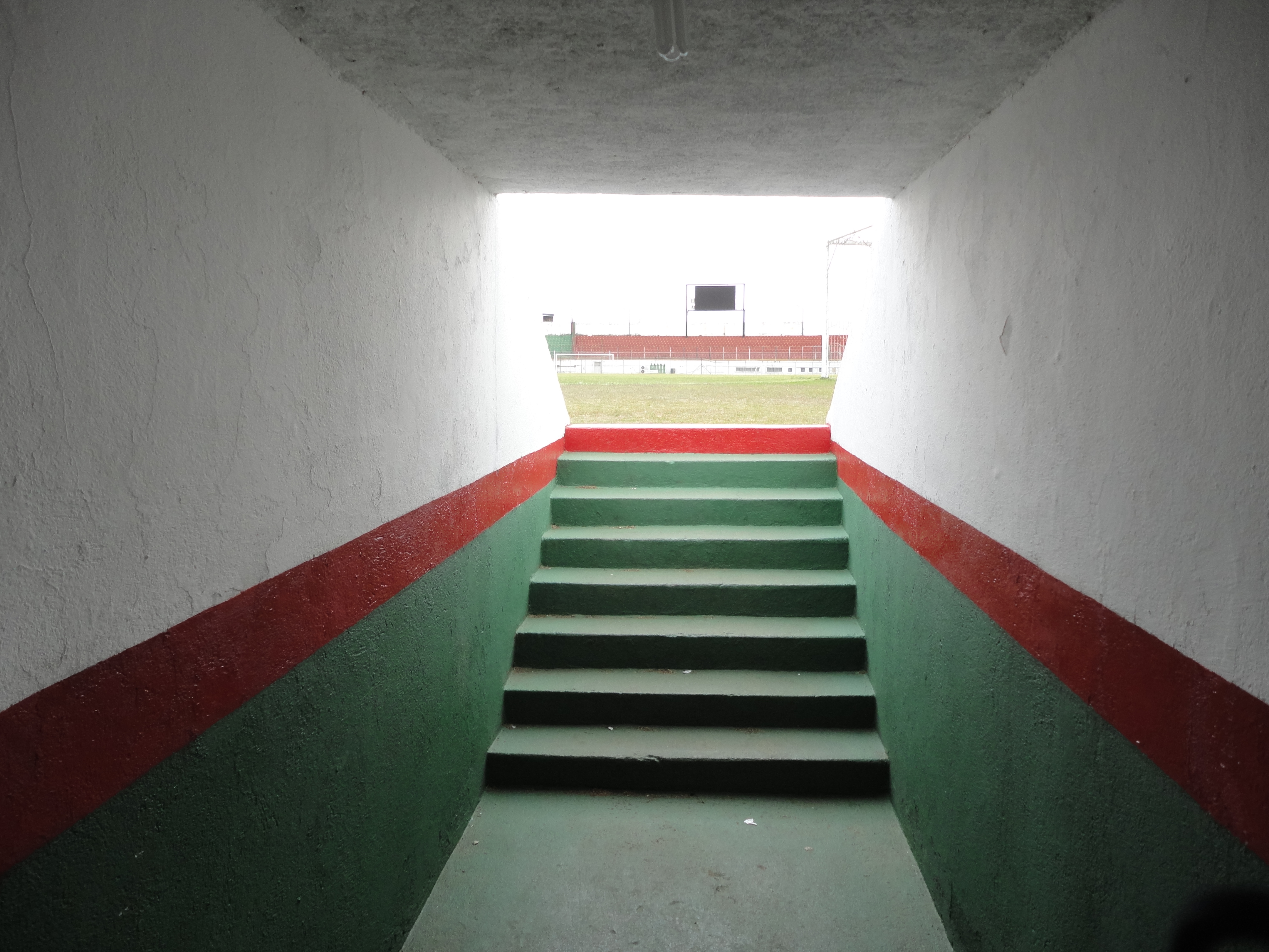 Túnel de acesso para o gramado do Canindé, em São Paulo, Brasil